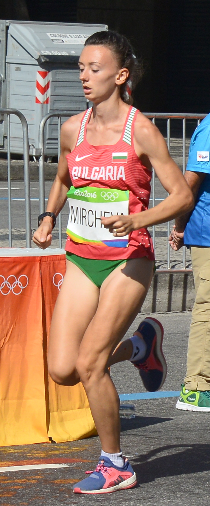 Passage du marathon des jeux olympiques de Rio 2016 dans le centre de Rio